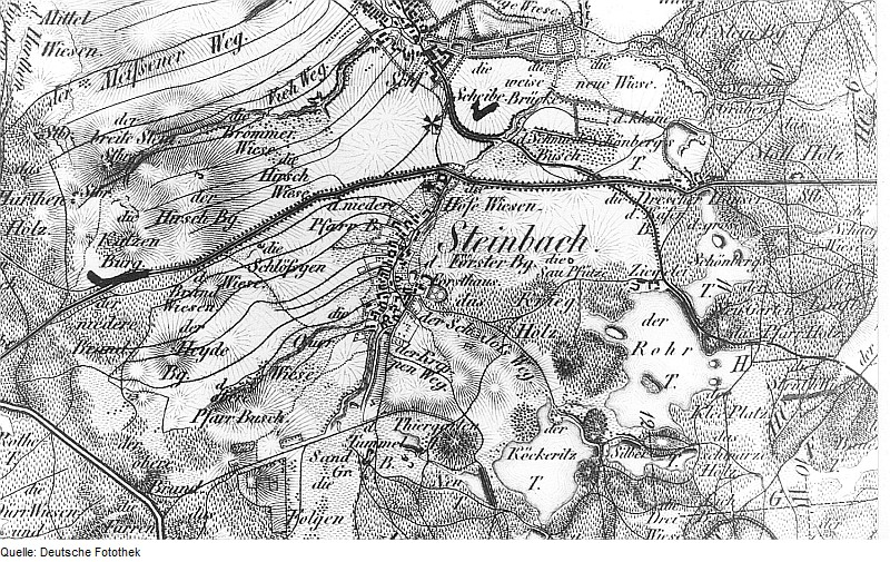 Original image description from the Deutsche Fotothek Moritzburg-Steinbach. Oberreit, Sect. Großenhain, 1841/43